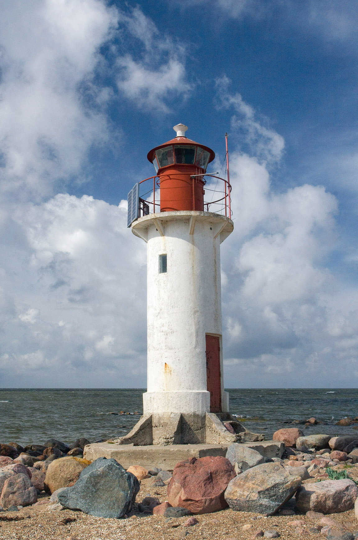 Manilaiu tulepaak